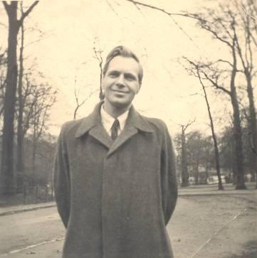 Pierre Gilbert à Uccle